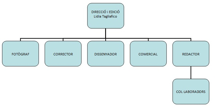 Organigrama La Voz